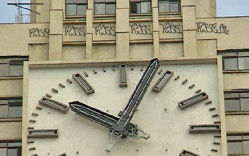 Foto relacionada ao assunto "pichação no Rio de Janeiro"